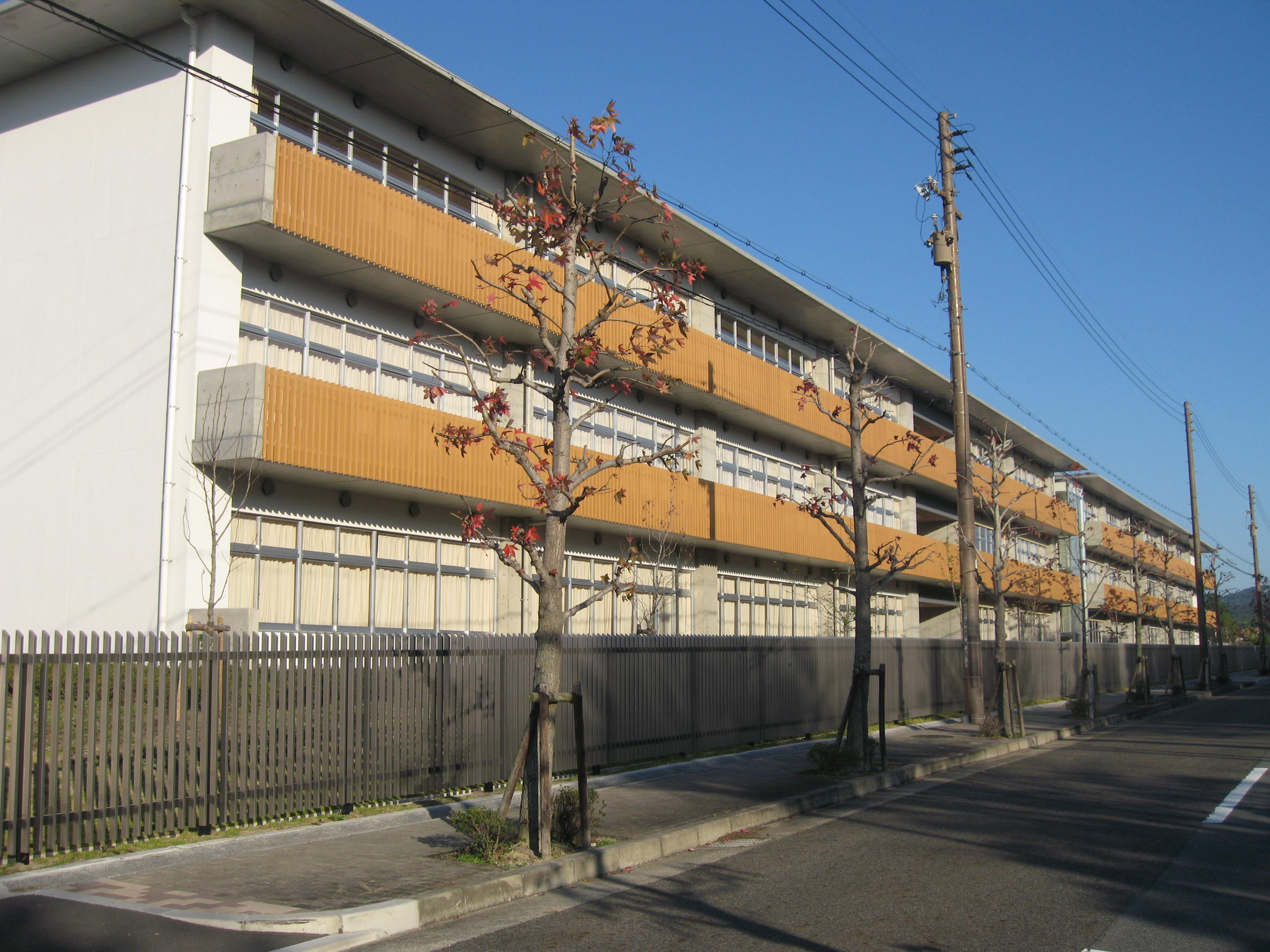 木津川市立木津南中学校校舎の画像